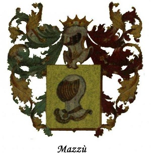 Stemma